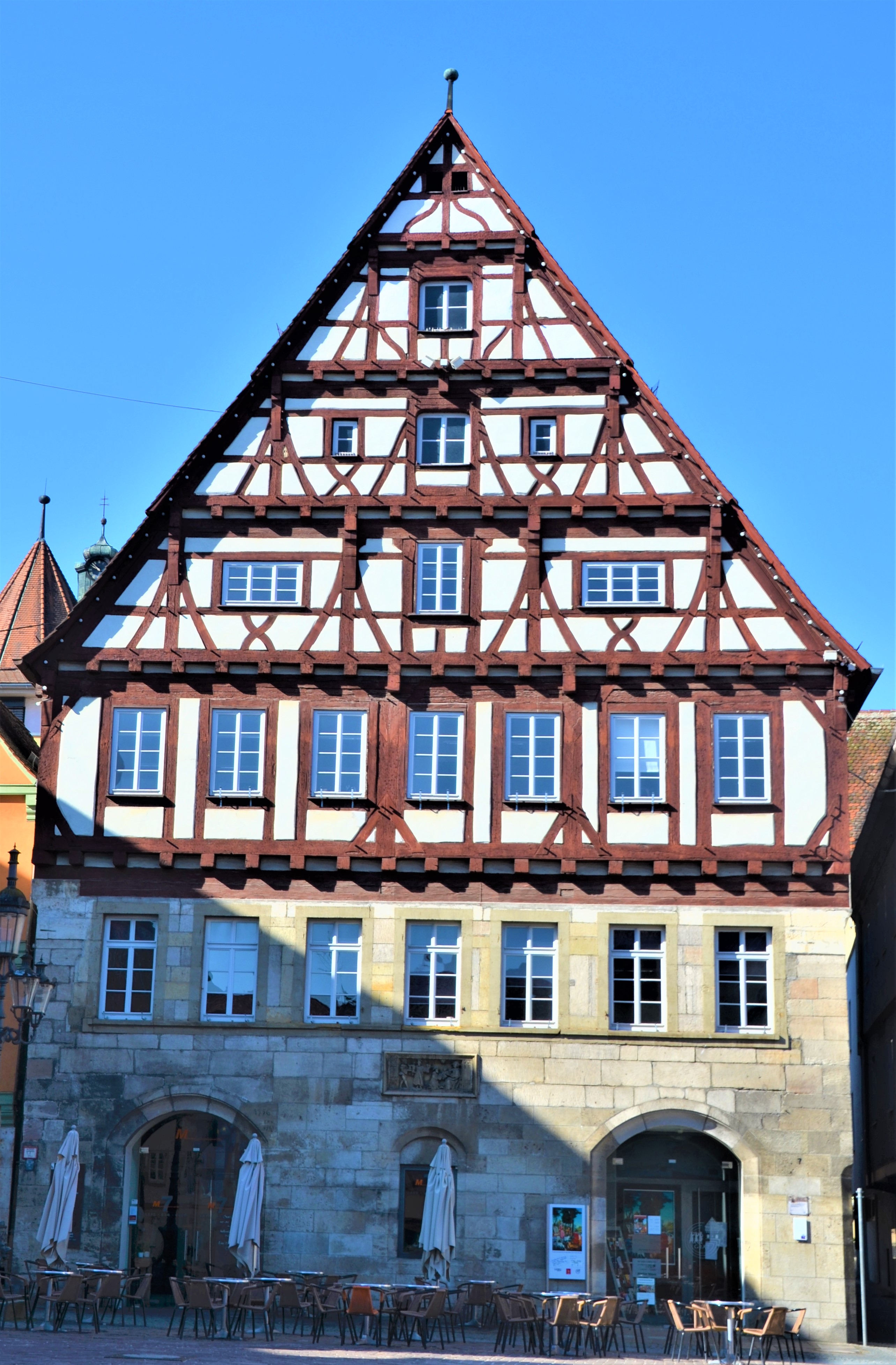 Grät am Marktplatz in Schwäbisch Gmünd im März 2020